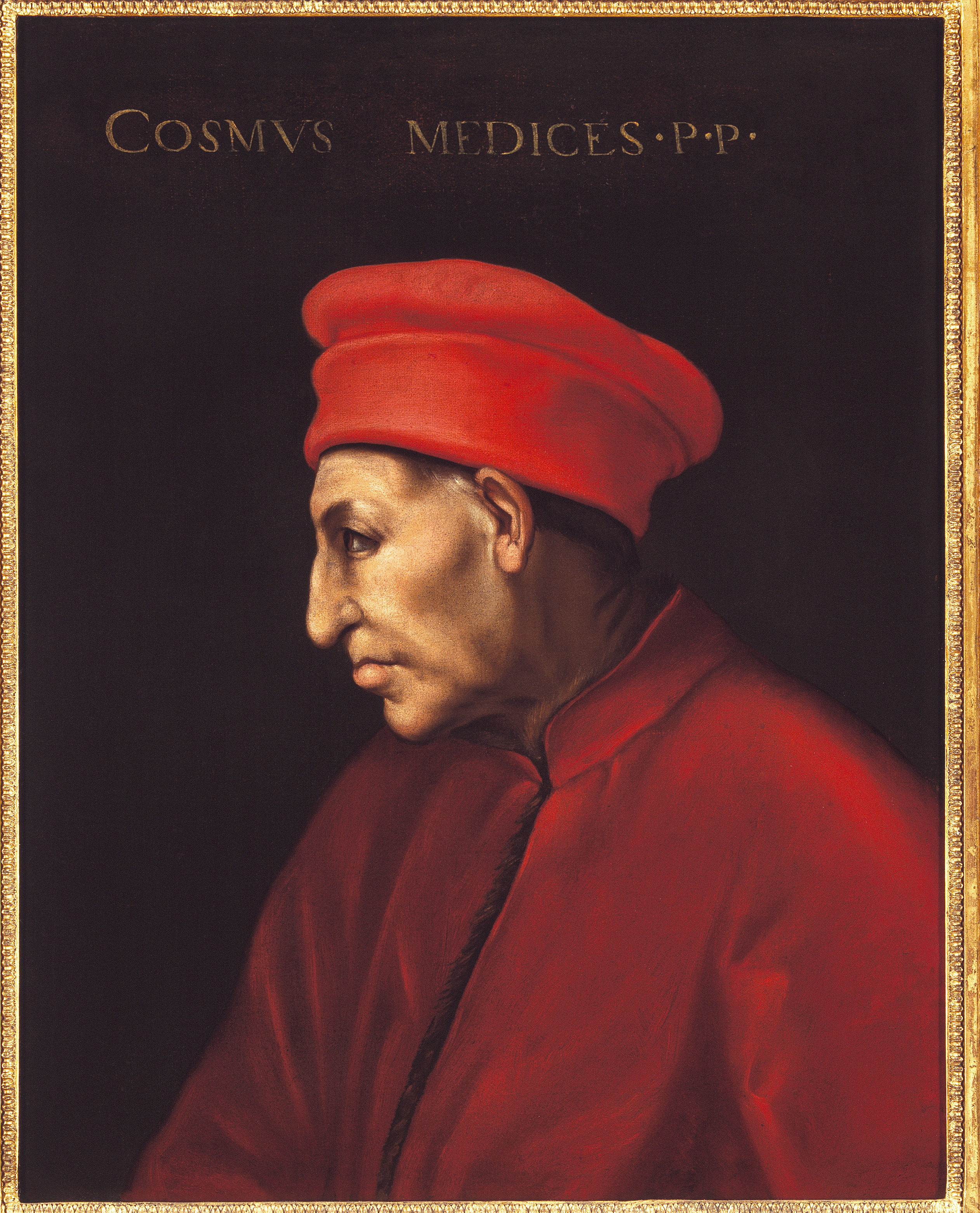 schilderij ( Peter Paul Rubens ( Museum Plantin-Moretus